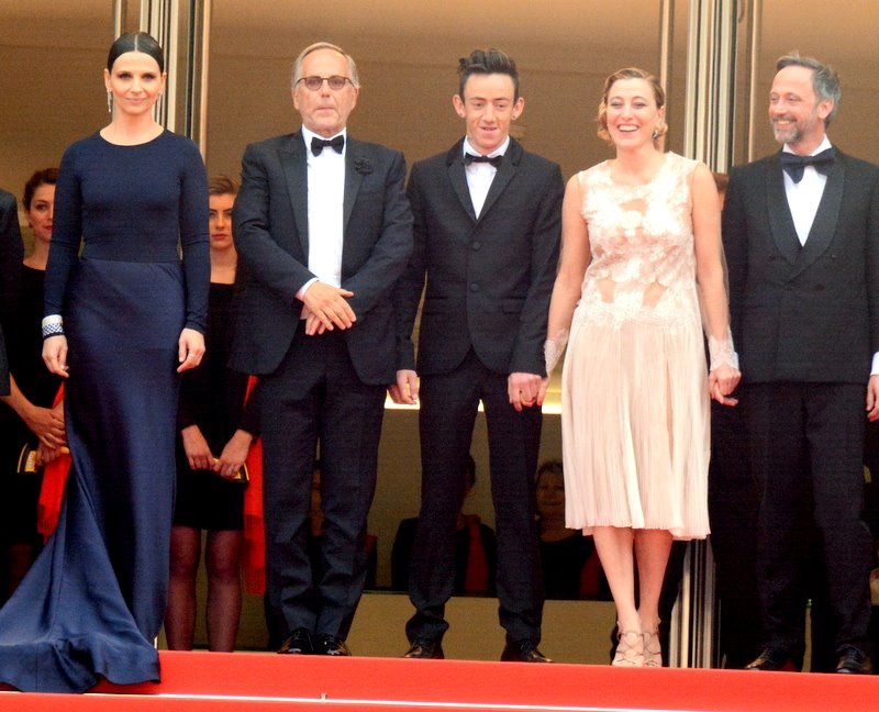 Présentation de "Ma Loute" au festival de Cannes. De gauche à droite, Juliette Binoche, Fabrice Luchini, Brandon Lavieville, Valeria Bruni Tedeschi et Jean-Luc Vincent